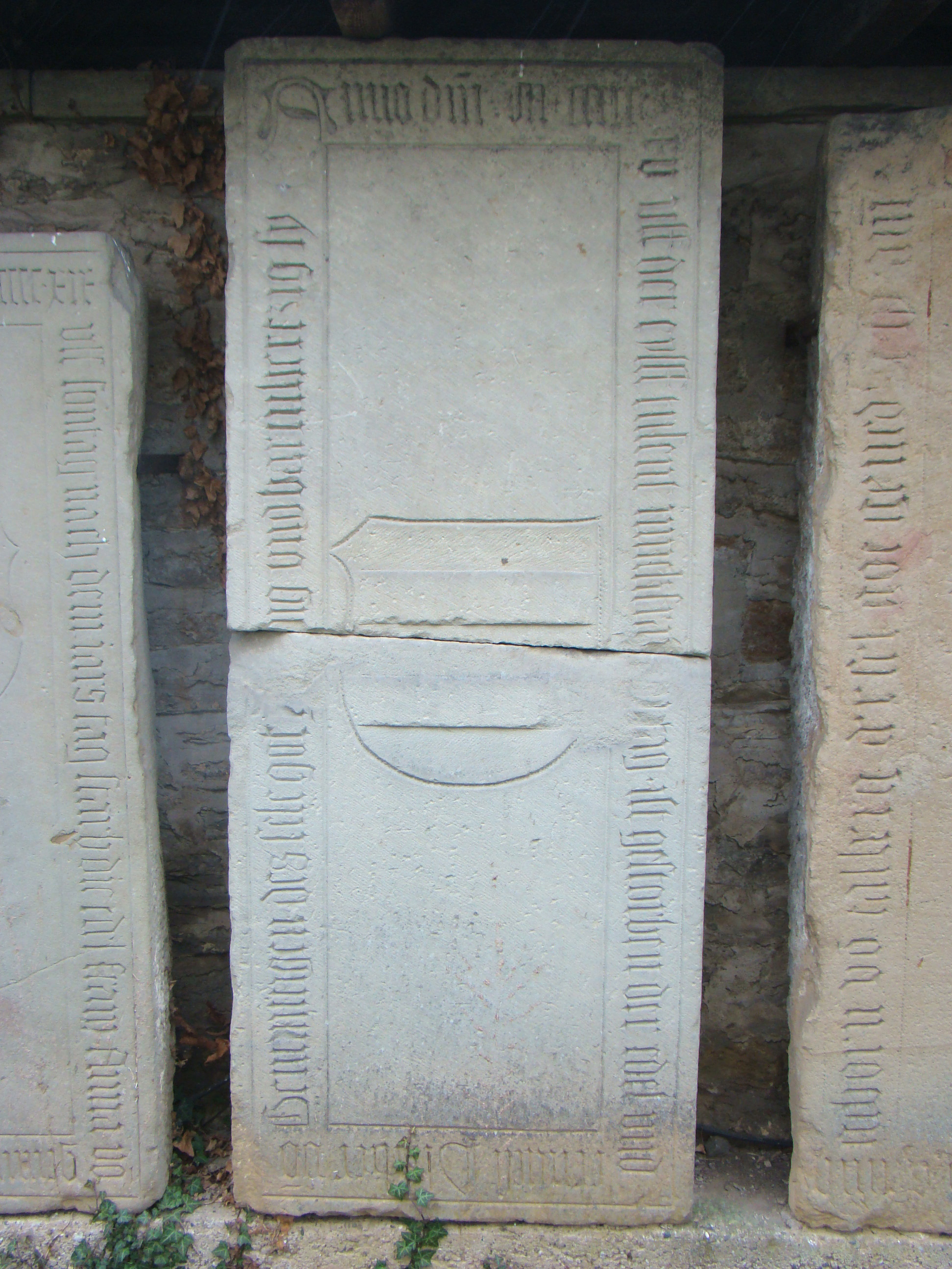 Historische Grabmale beim Unterschloss Gemmingen